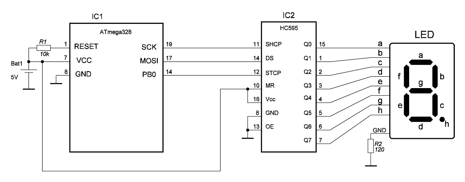 7-segmendilise indikaatori juhtimine nihkeregistri abil